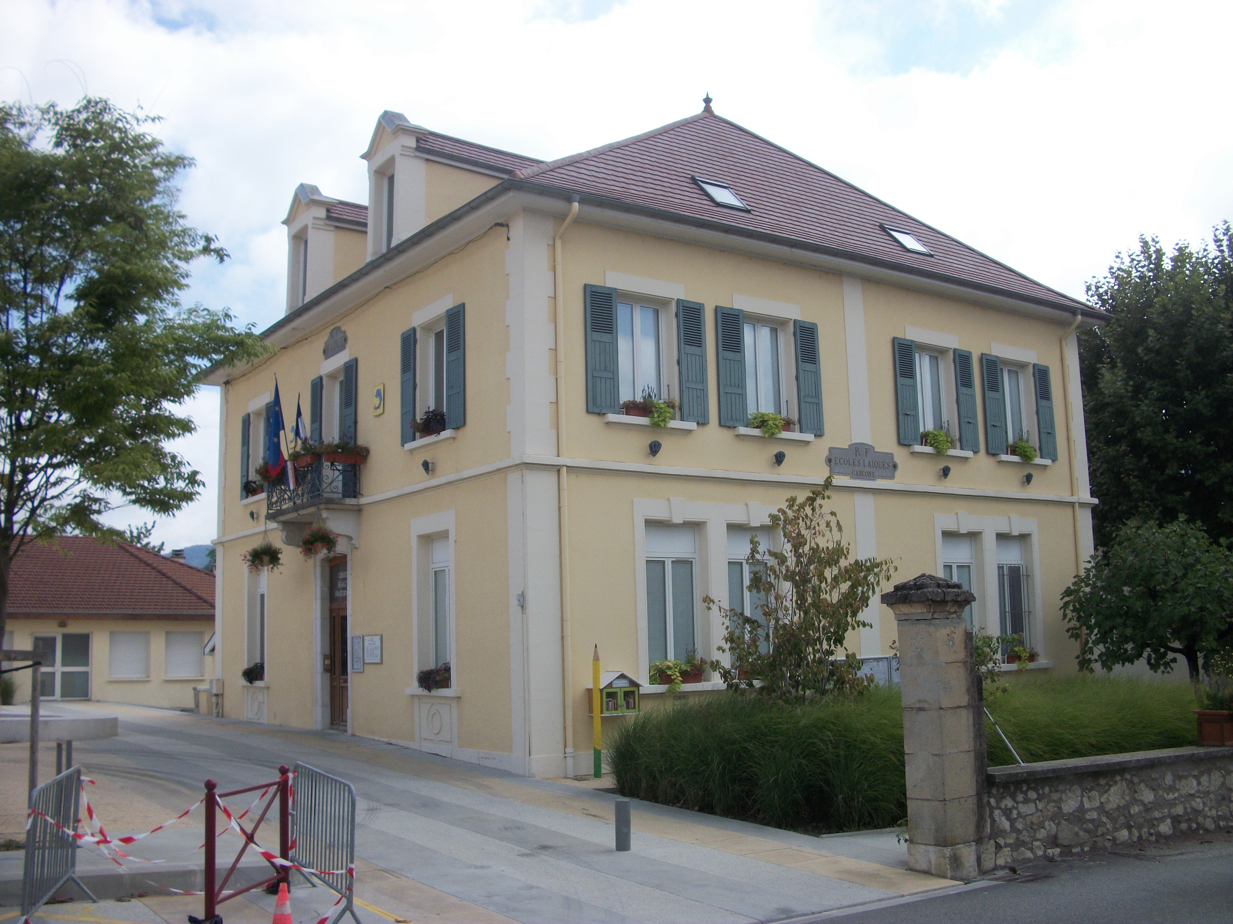 Mairie de Saint-Jean-de-Moirans, Isère, France Object location45° 20′ 29.76″ N, 5° 34′ 57.65″ E Vue générale